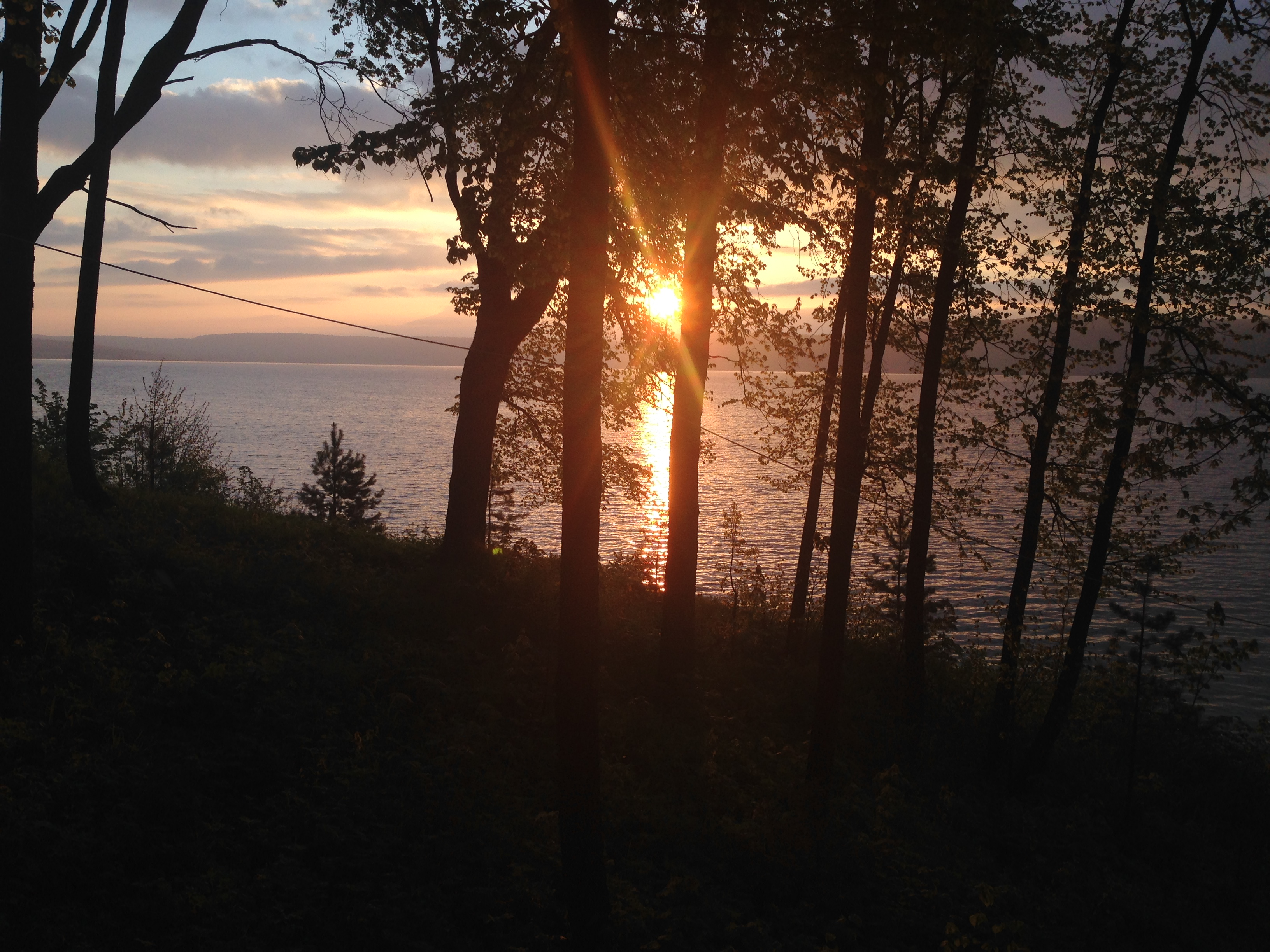 Башкирия, национальный парк: Нугуш,Мелеузовский район, Башкортостан This image is related to the protected area of Russia number 0200098